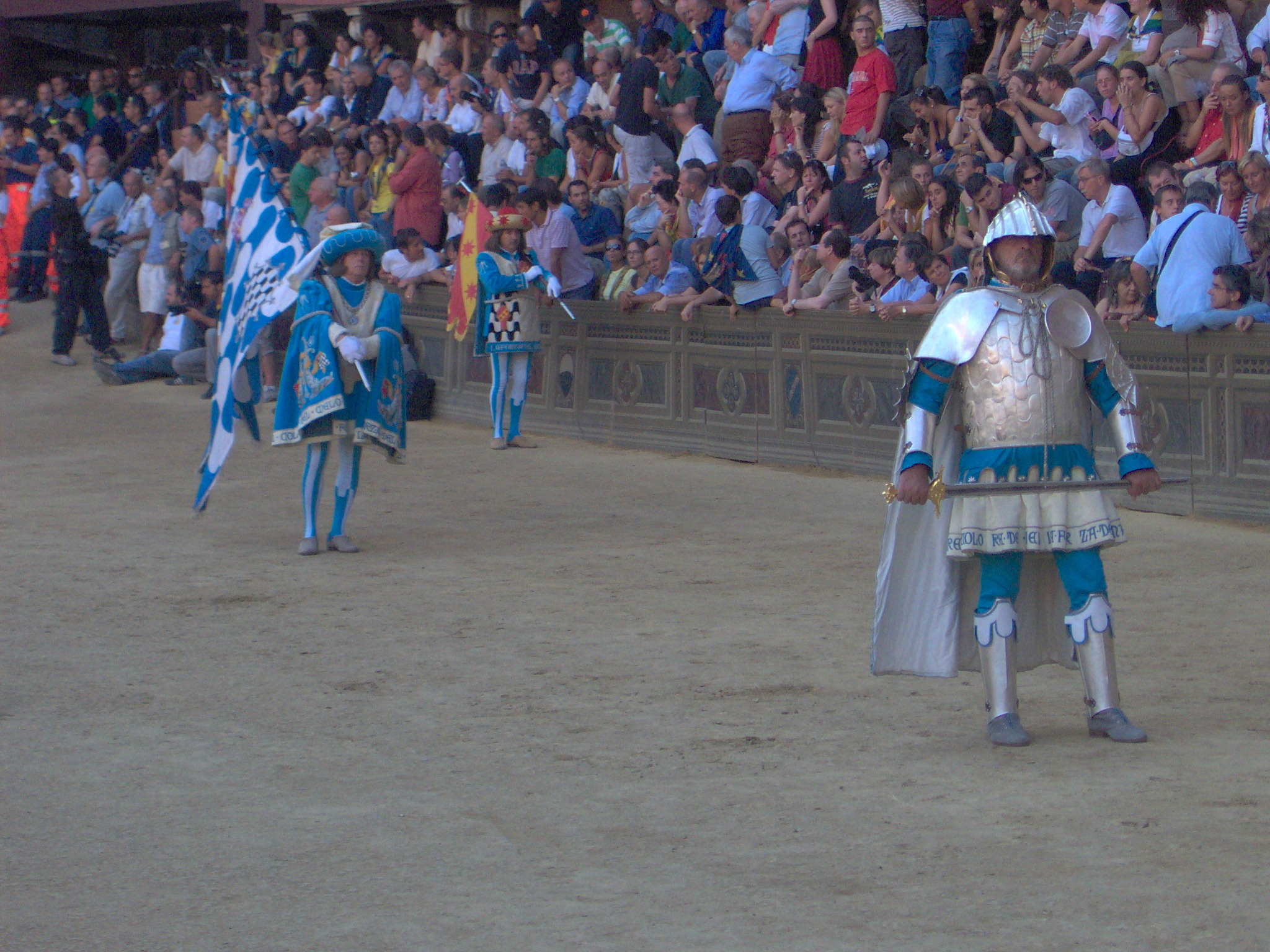 Image del corte del Palio di Siena - agosto 2006